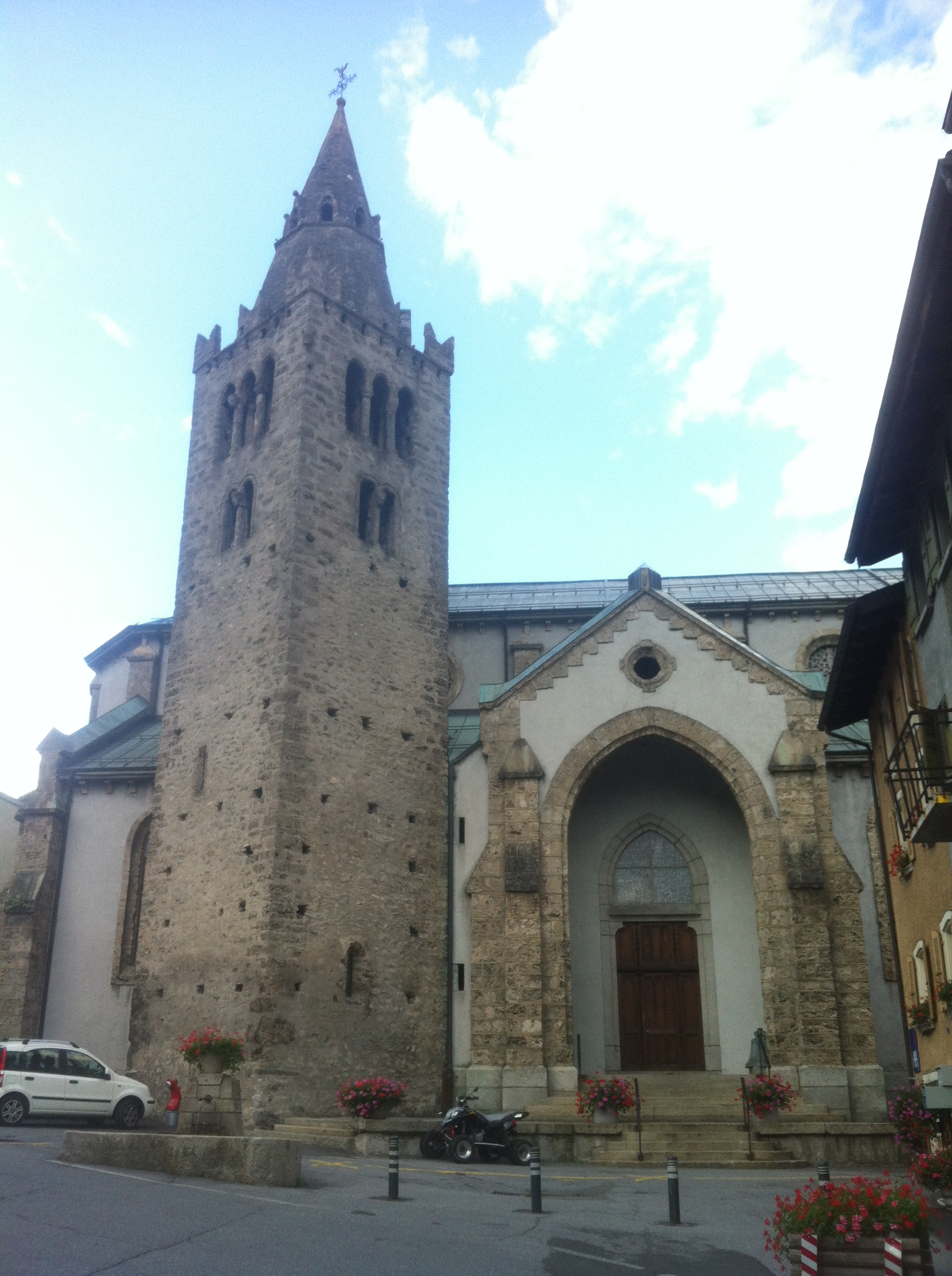 Iglesia en Orsieres